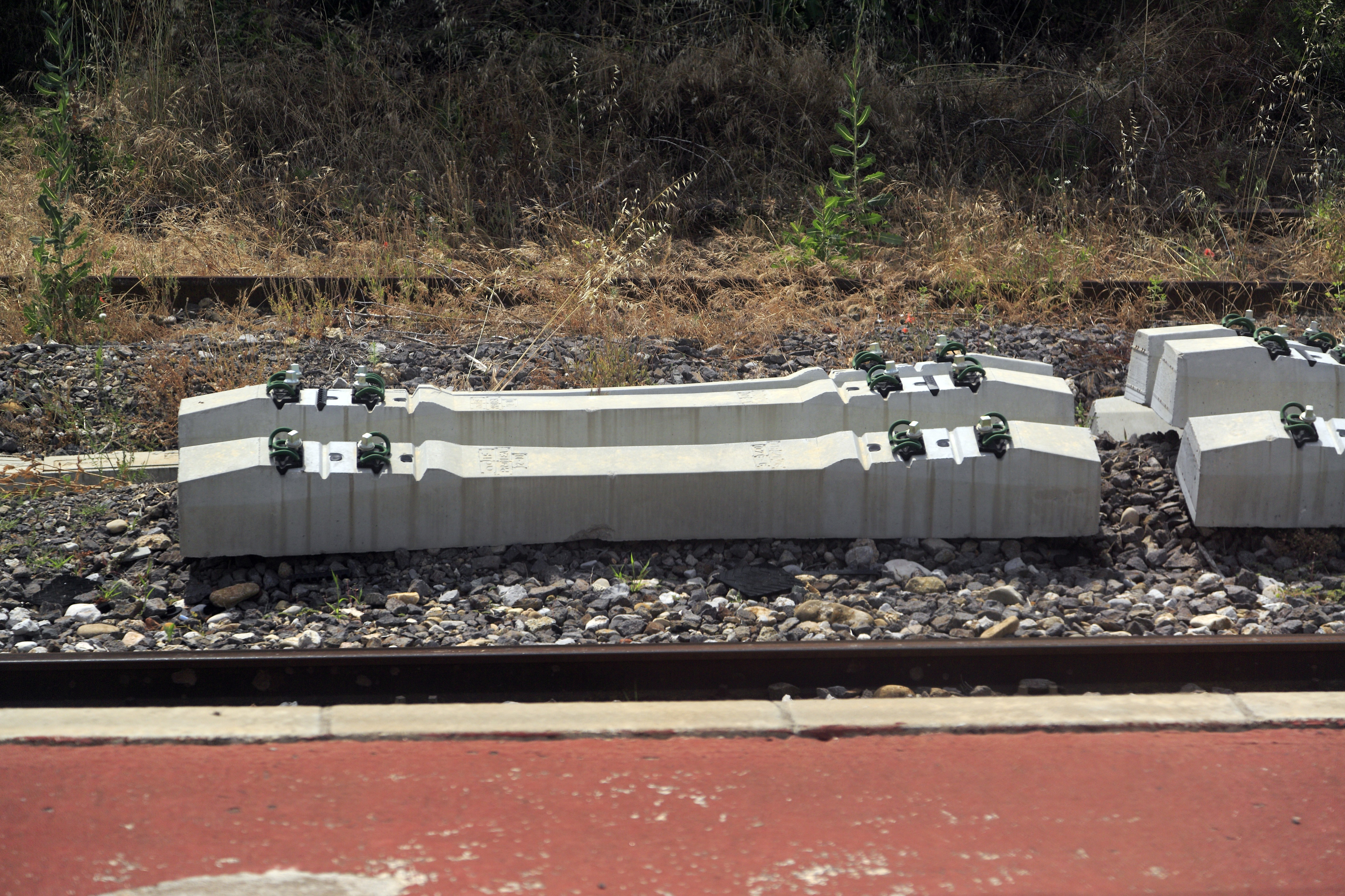 Zum Einbau bereitliegende umspurbare Betonschwellen, in Breitspurstellung vormontiert. Die Kunststoffzwischenlagen zwischen Schwelle und Schiene fehlen. Für den Einsatz mit Regelspur werden die Schienenbefestigungen und die Blindabdeckungen jeweils in die andere Position umgesetzt, das ist bei angehobenen Schienen im eingebauten Zustand möglich. Zwischen Gerona und Portbou, Katalonien.